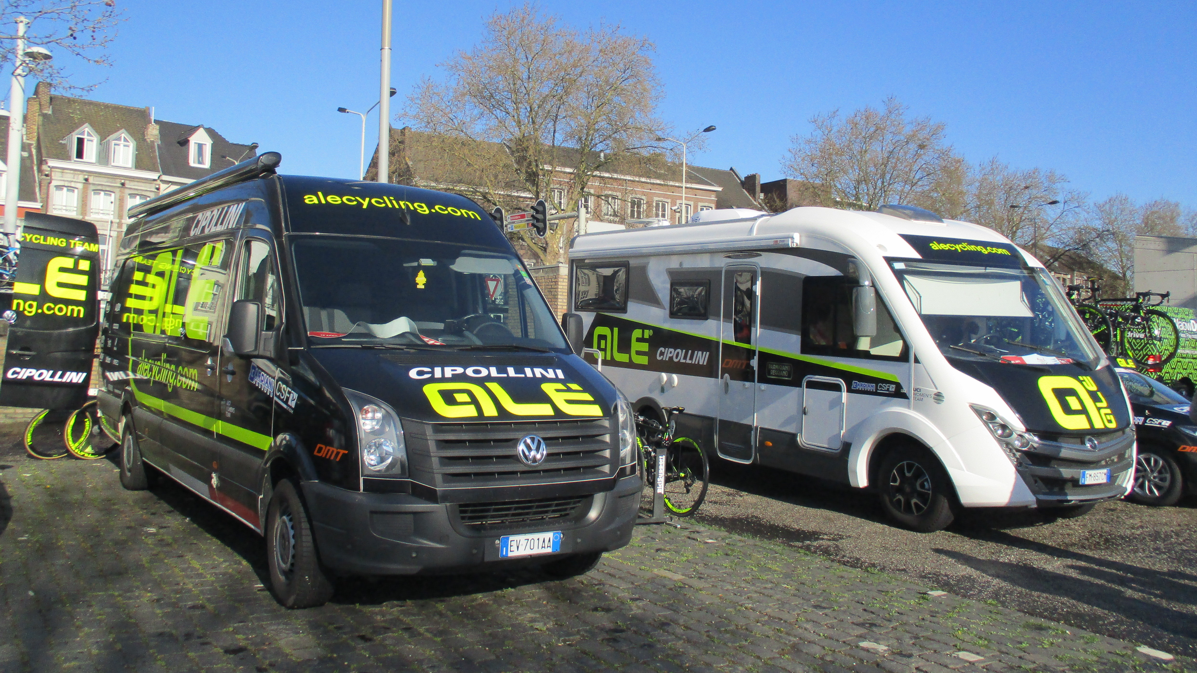 Start van de Amstel Gold Race Ladies Edition 2018 in Maastricht.